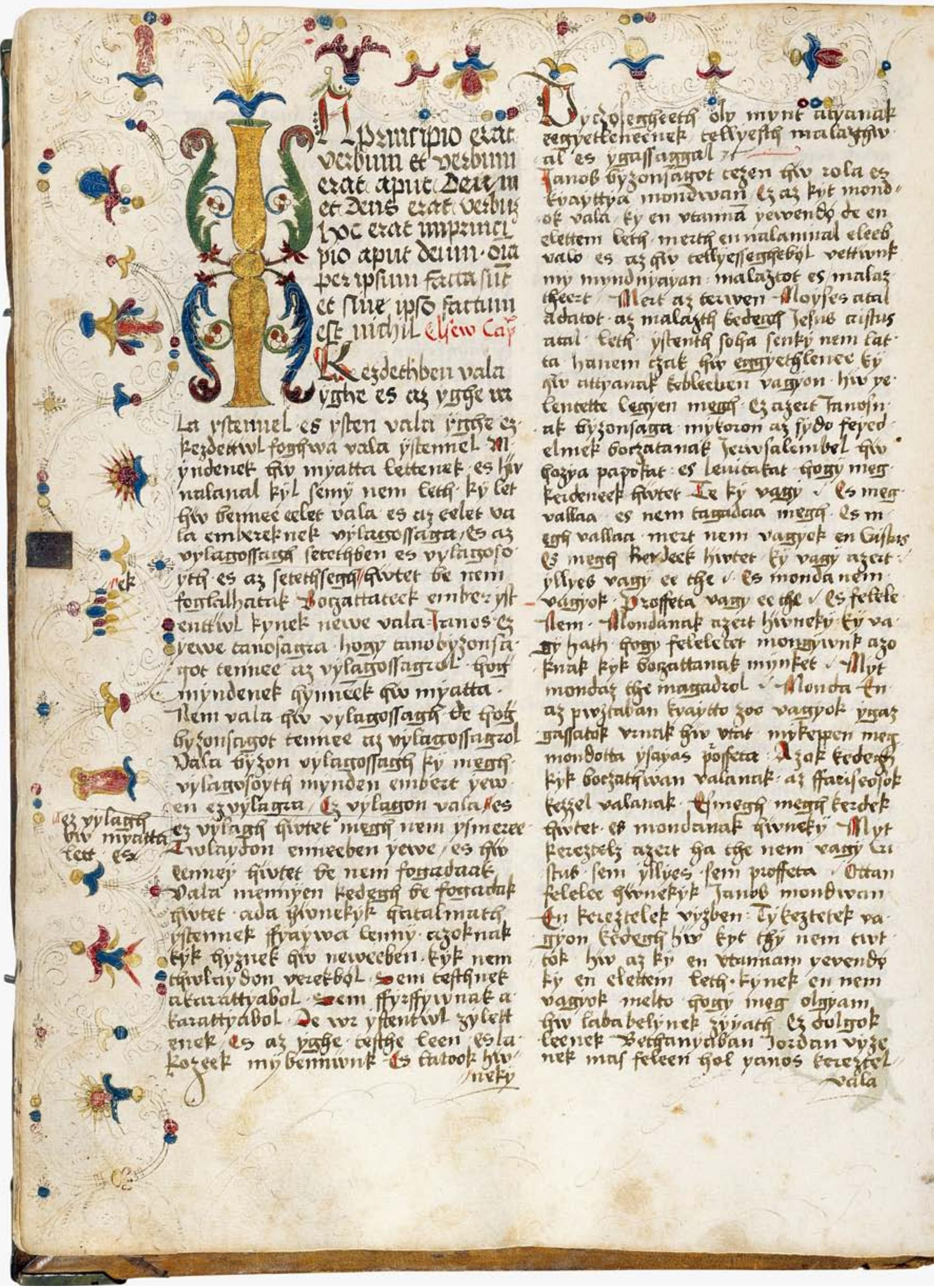 A Jordánszky-kódex egyik lapja